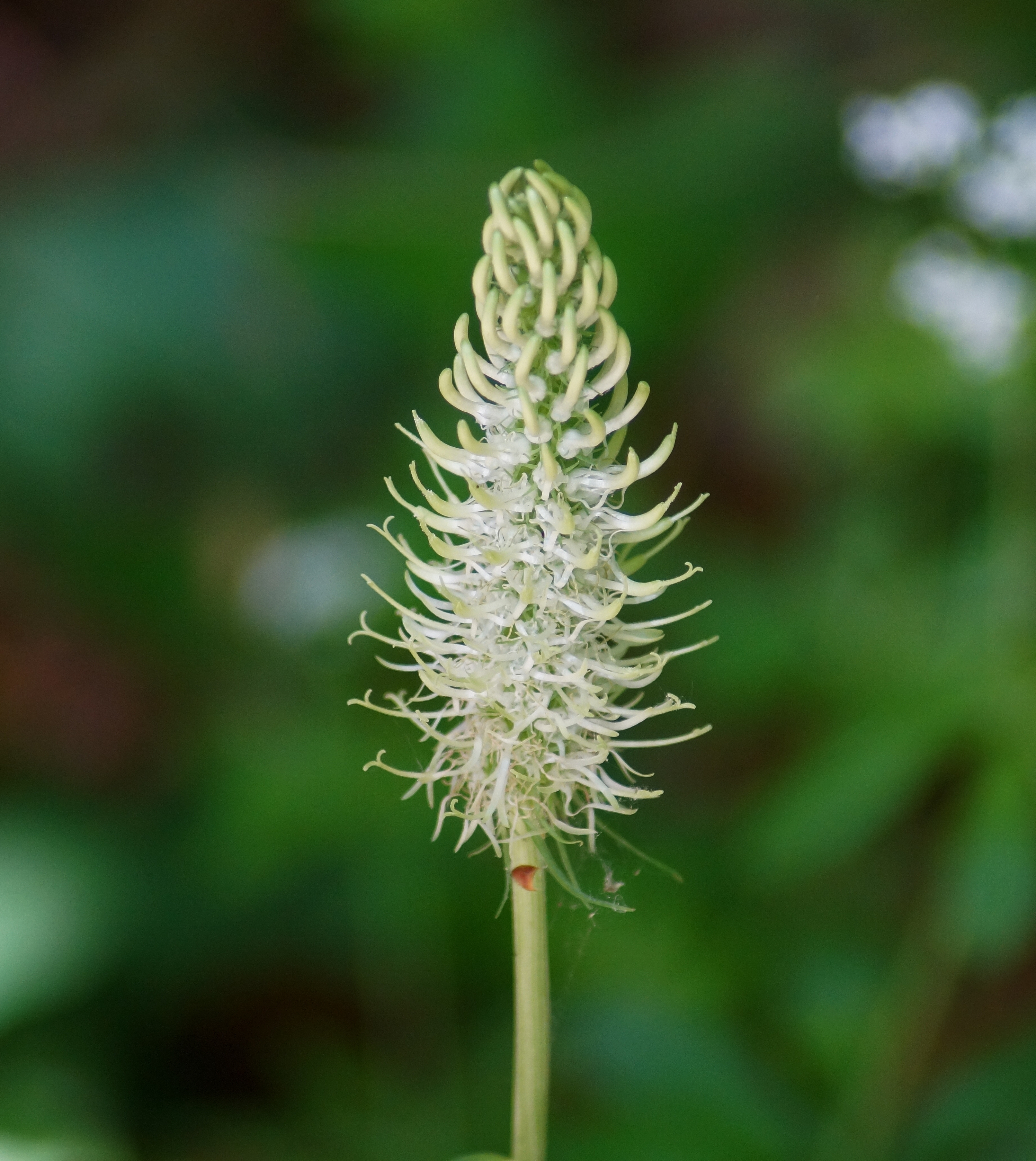 Ährige Teufelskralle (Phyteuma spicatum) Blüte im Naturschutzgebiet Wilzenberg